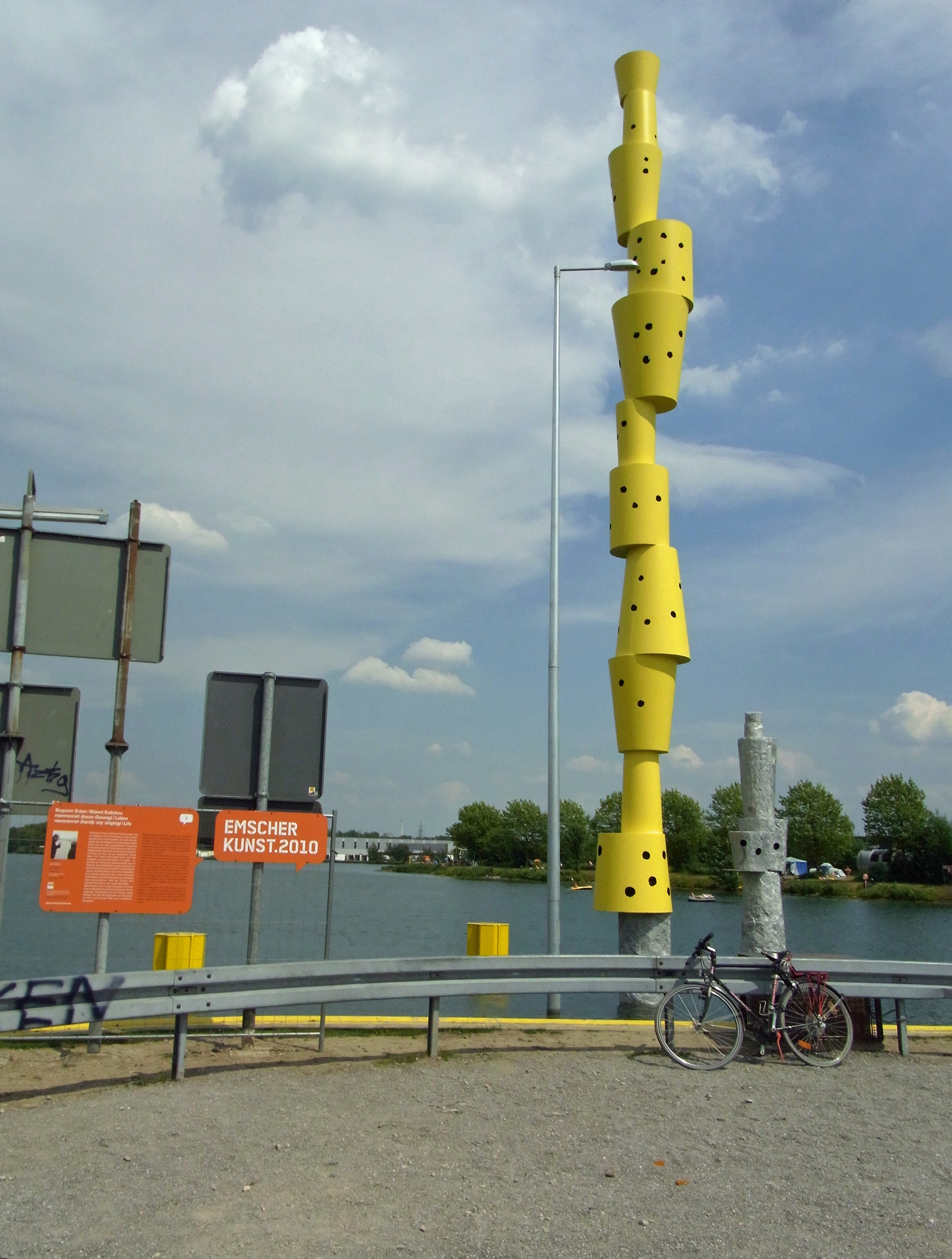 Emscherkunst.2010 Bogomir Ecker/Bülent Kullukcu: reemrenreh (kaum Gesang)/Leben am Herner Meer